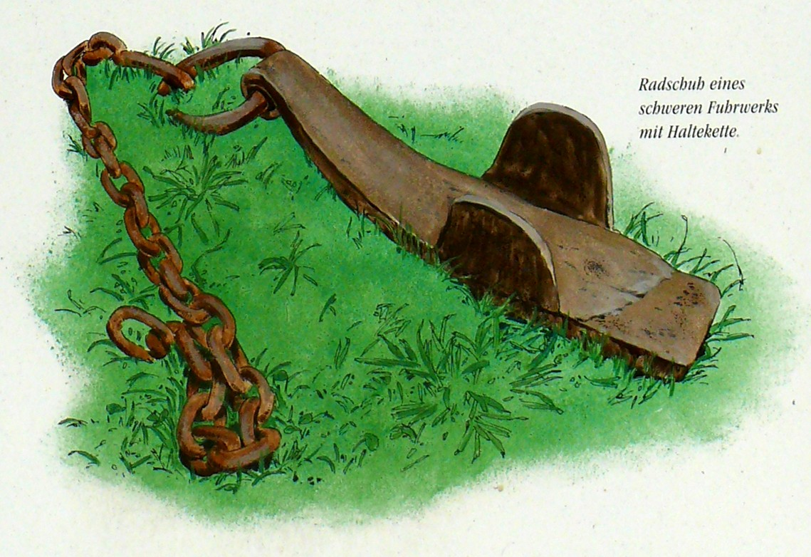 Radschuh, mit dem schwere Wagen vom Berg nach unten auch gezogen werden mussten, wenn der Radschuh unter einem Rad befestigt wurde